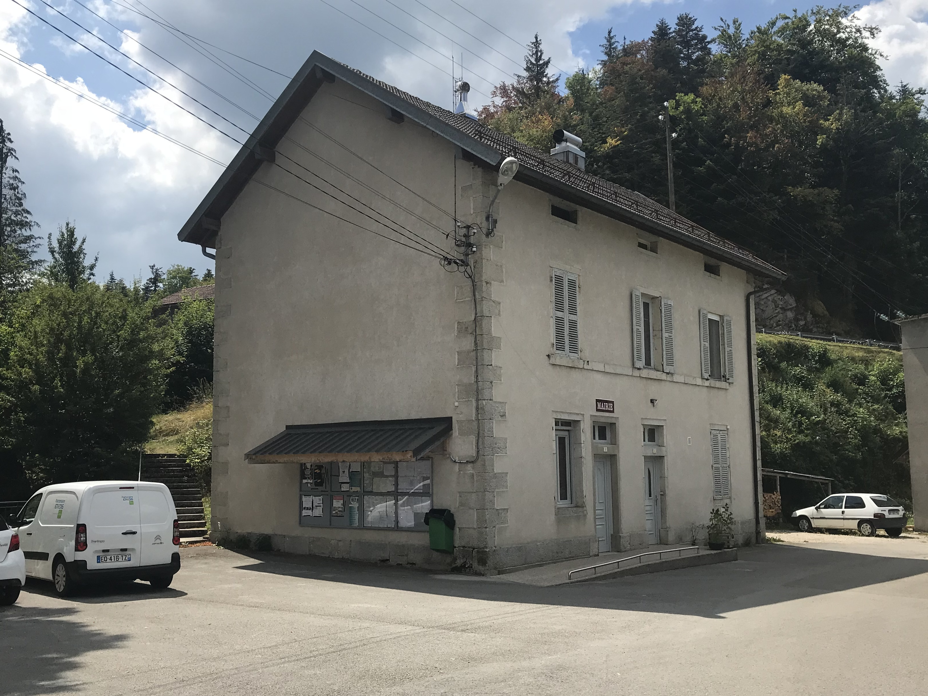 Village de Châtel-de-Joux (Jura) en juillet 2018.